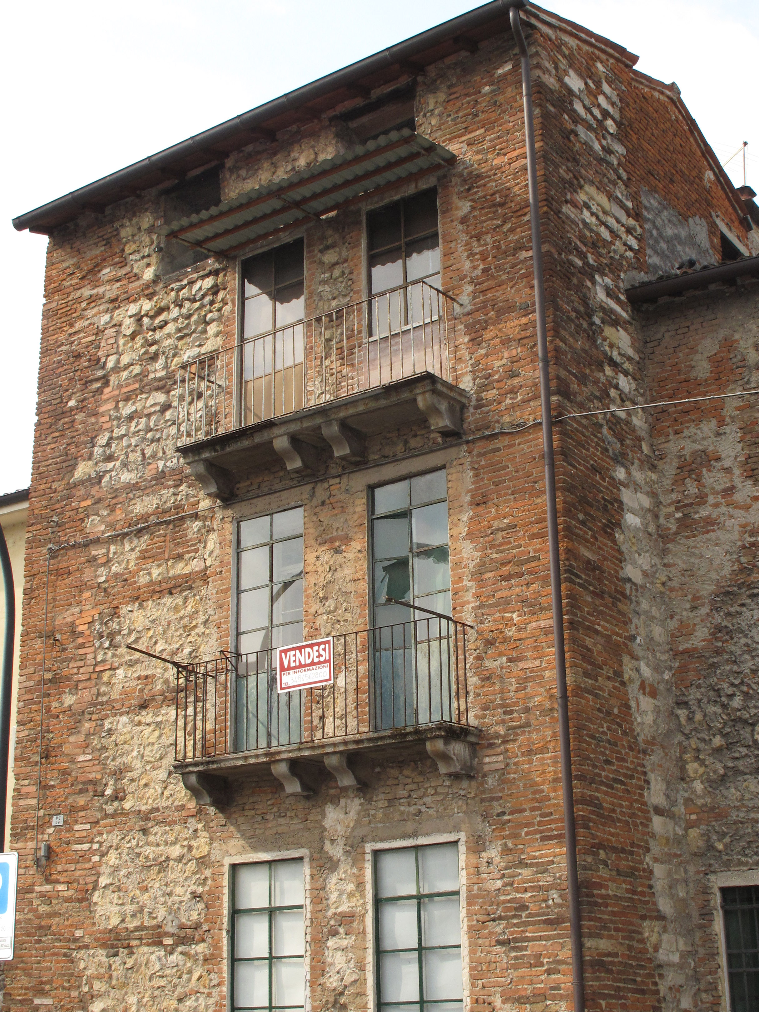 Vicenza - Mura scaligere orientali in via Ceccarini